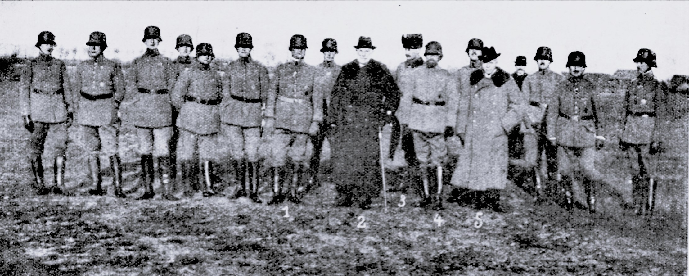 Bürgermeister H. Eschenburg (3) und Senator Dr. Vermehren (5) bei den Offizieren des Ruhebataillons vom Regiment „Lübeck“ während der Parade bei Roulers